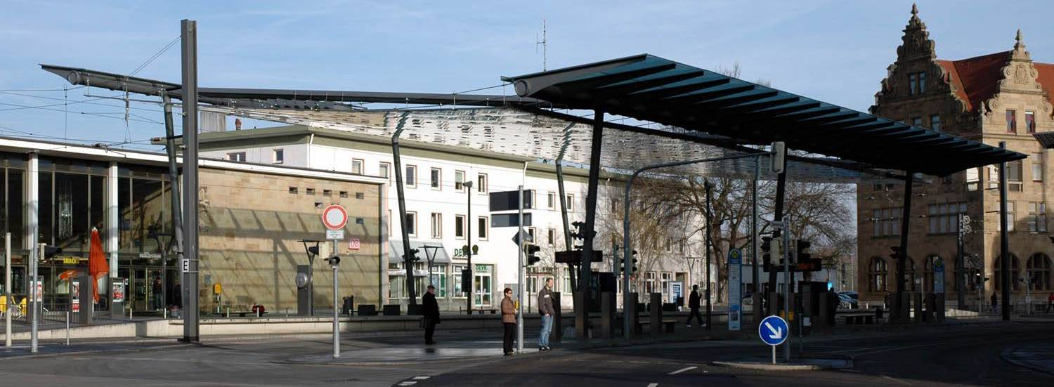 Heilbronner Hauptbahnhofs, Überdachung der Stadtbahn-Haltestelle.